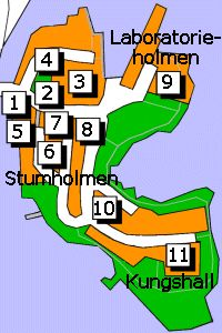 Karta över Stumholmen i Karlskrona